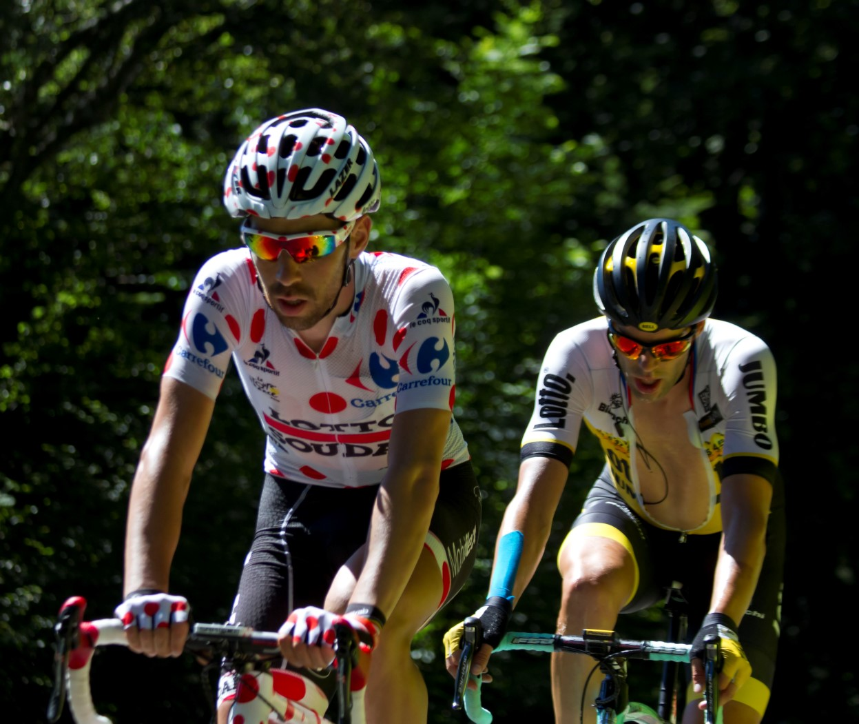 140 de gendt